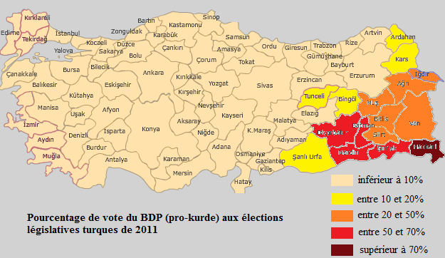 Pourcentage de vote du BDP (parti recueillant habituellement les votes des kurdes de Turquie) aux élections législatives turques de 2011